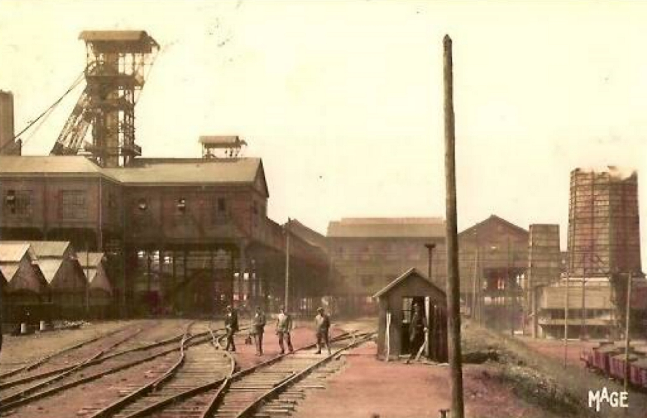 La Fosse n° 2 bis - 2 ter de la Compagnie des mines de Marles était un charbonnage constitué de deux puits situé à Marles-les-Mines, Pas-de-Calais, Nord-Pas-de-Calais, France.